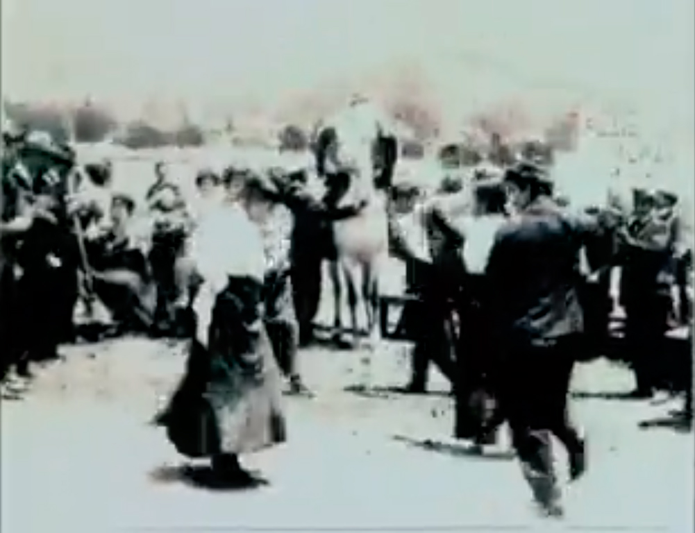 Fotograma de "Un paseo a Playa Ancha" (1903), Documental de 2 minutos grabado en Valparaíso, Chile, por el francés A. Massonnier. Formato 35 mm, b/n. Película del cine chileno más antigua que se puede ver en la actualidad.